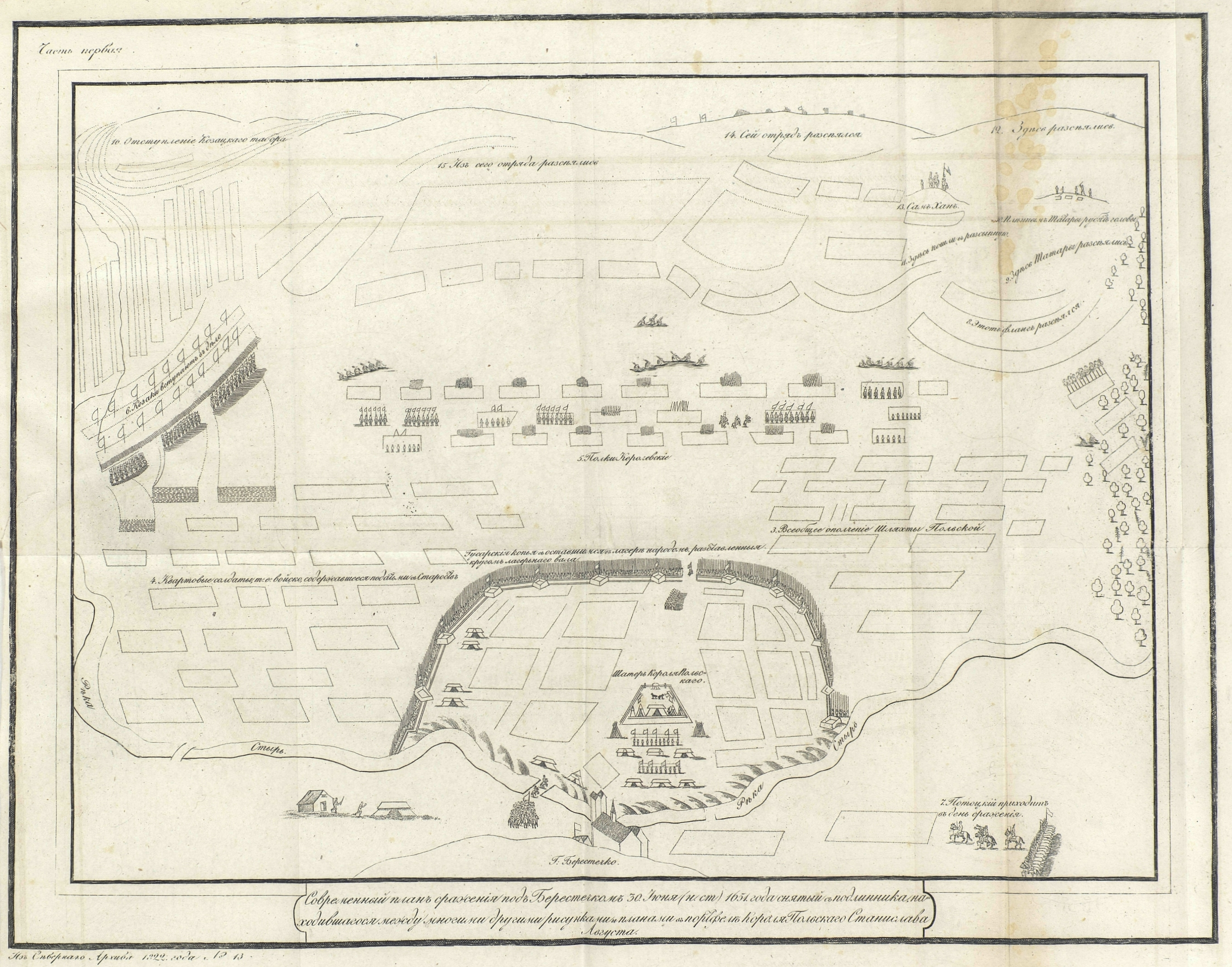 План сражения под Берестечком 30 июня 1651 года снятый с подлинника, находившегося между многими другими рисунками и планами в портфеле короля польского Станислава Августа. Из Северного Архива 1822 года.